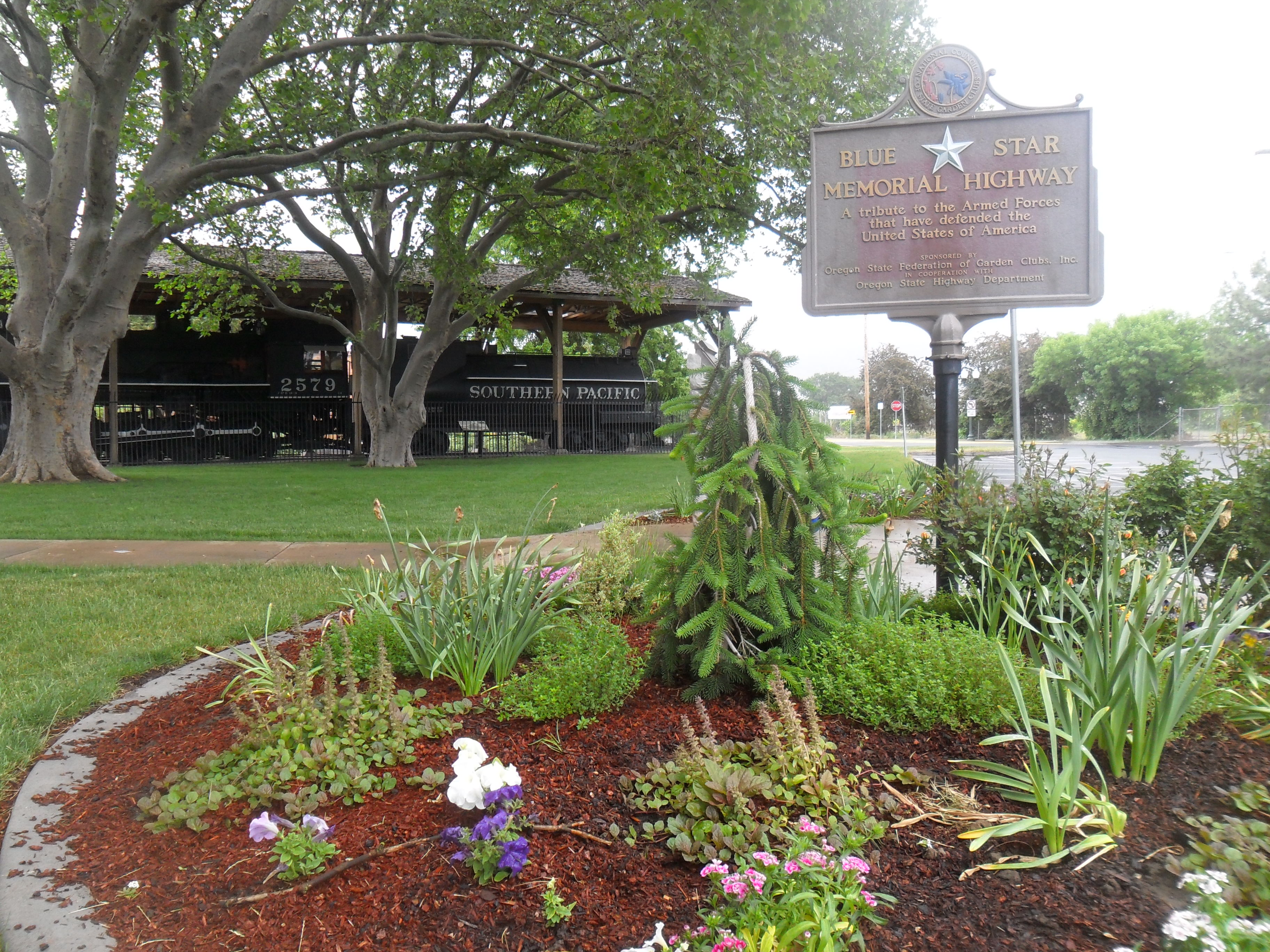 Locomotive 2579 in the background, Blue Star Memorial Highway marker on Klamath Falls Veterans Memorial Park, Oregon